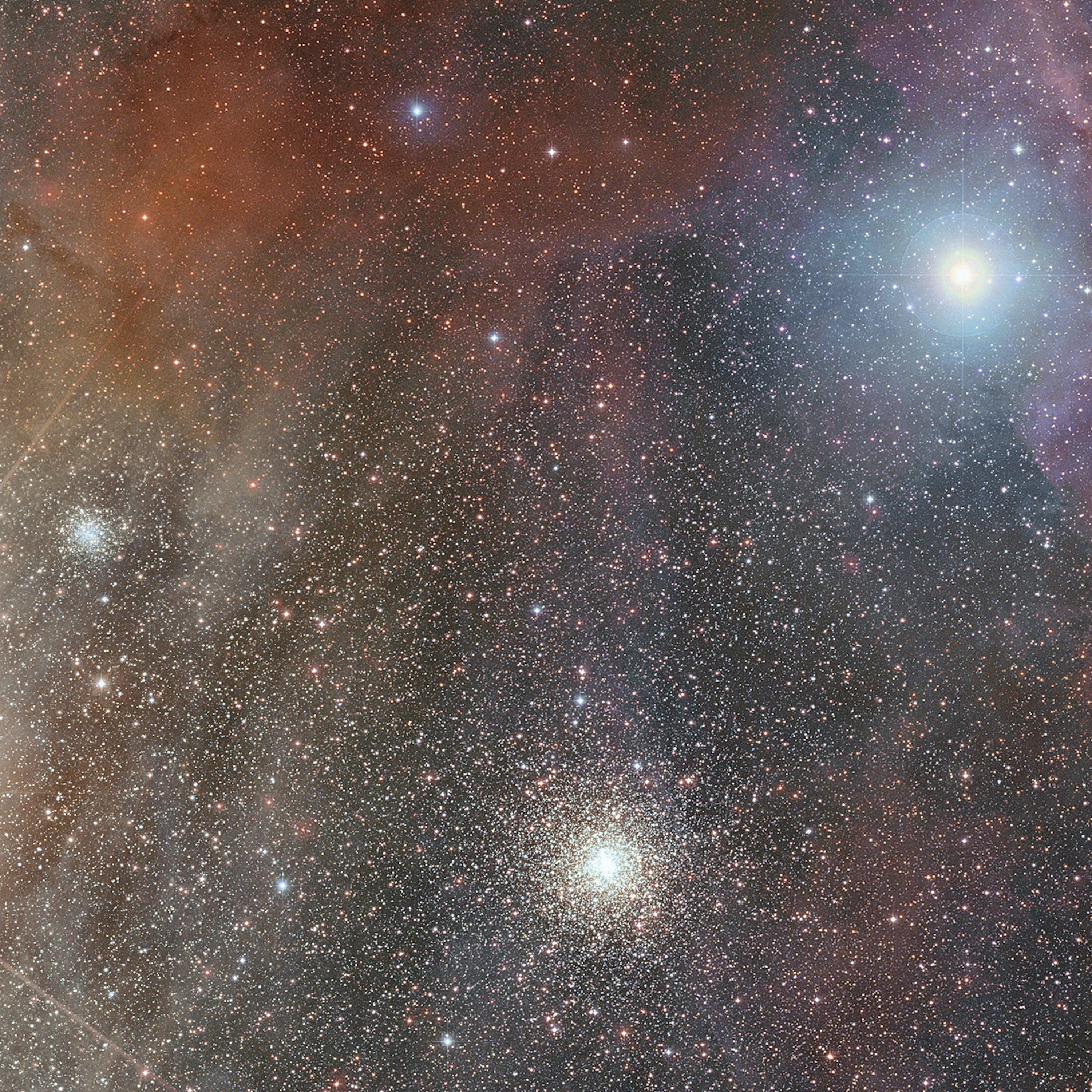 DSS/ POSS II / WISE